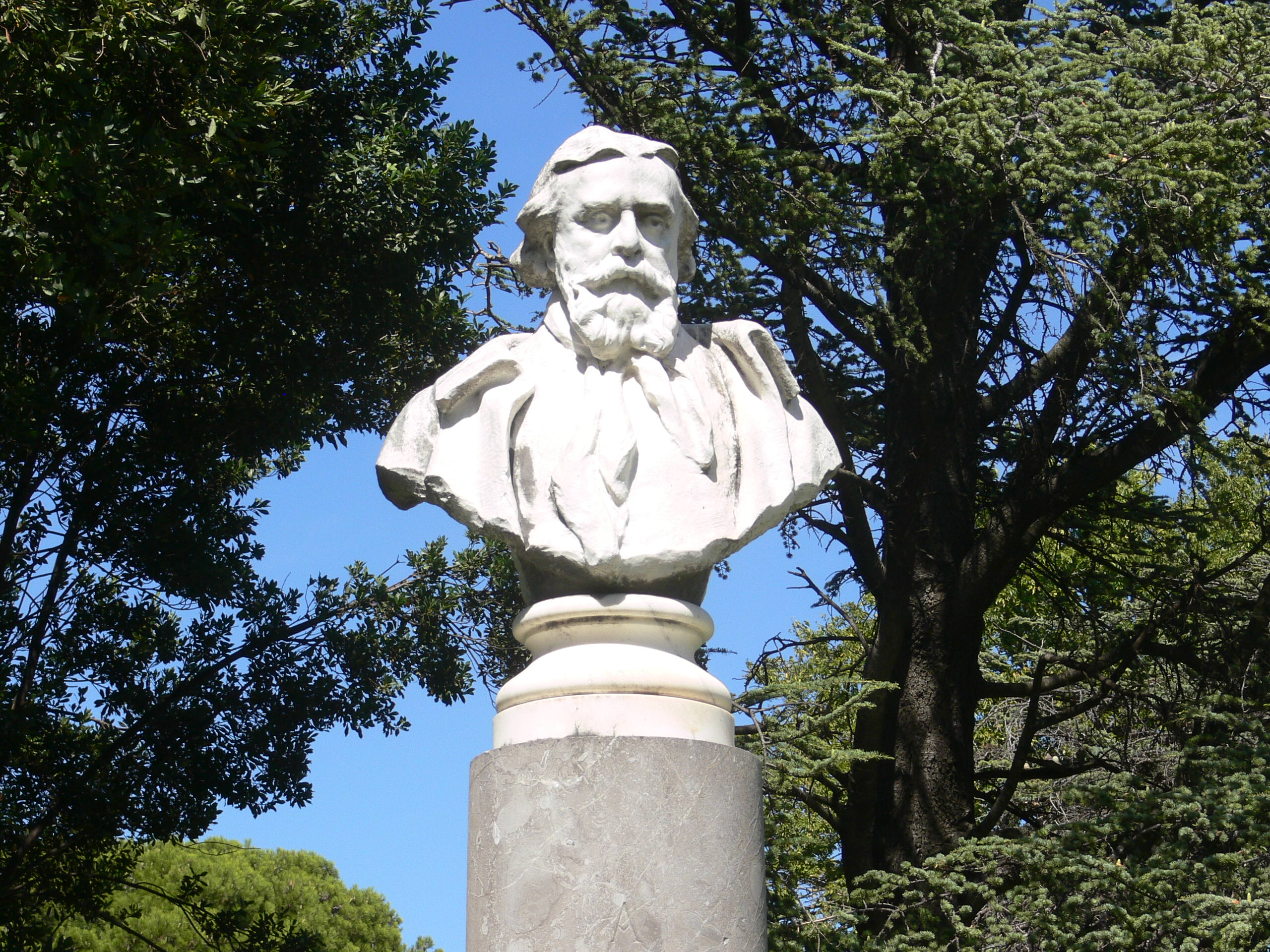 Buste de Félix Gras dans le jardin des Doms d'Avignon